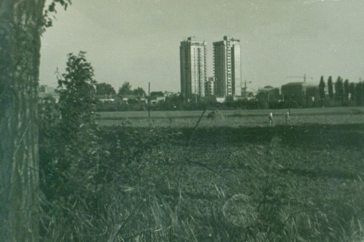 Immagine provenienti da mio archivio personale digitalizzato - Grattacielo di Ferrara negli anni 70